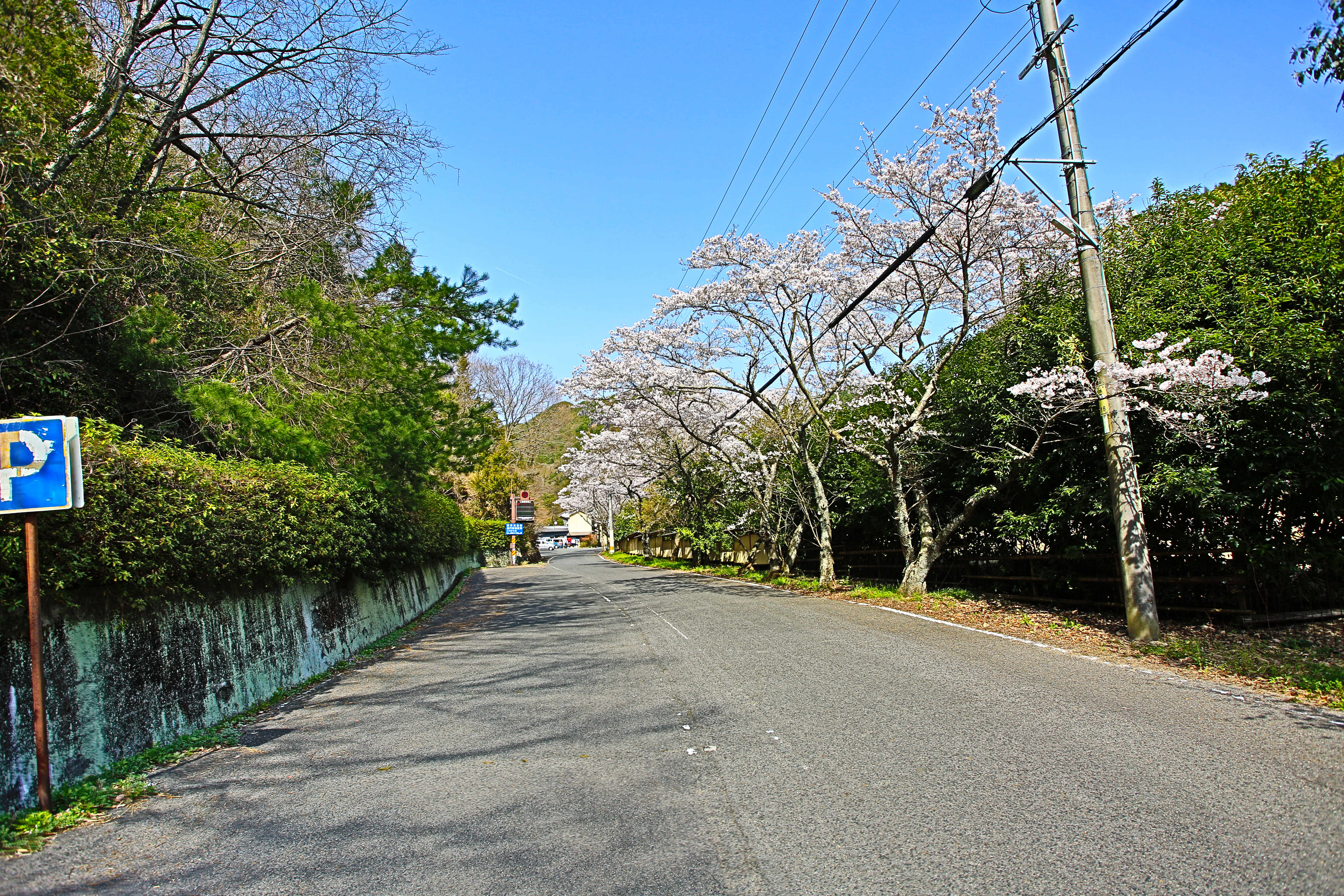 広島県福山市本郷町本郷温泉地区のメインストリート。広島県道158号線。桜満開。